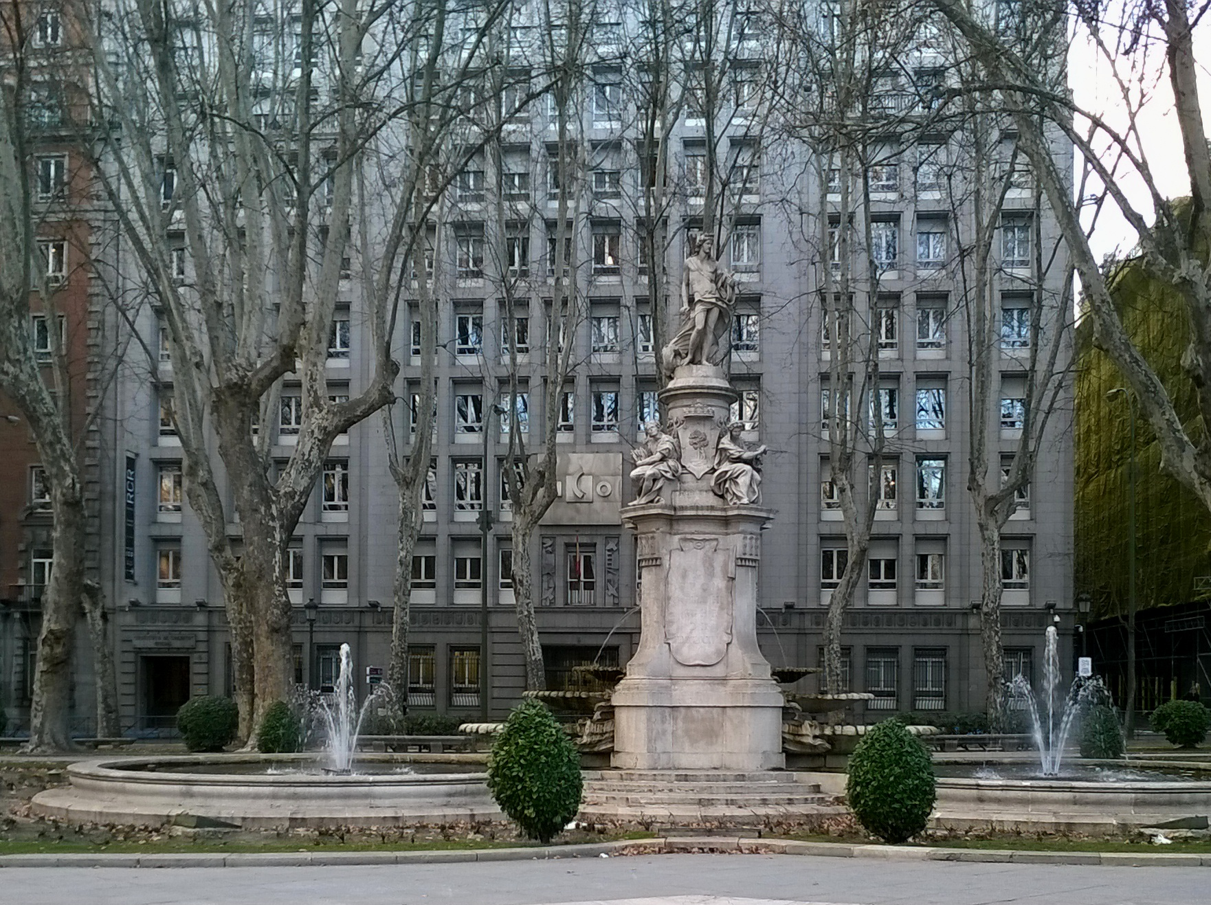 Madrid Paseo Del Prado Fuente De Apolo